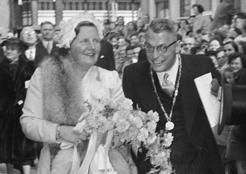 Collectie / Archief : Fotocollectie Anefo Reportage / Serie : Koningin Juliana brengt een bezoek aan Culemborg en Vreeswijk Beschrijving : koningin, bezoeken, burgemeesters, Juliana, koningin Datum : 28 mei 1952 Trefwoorden : bezoeken, burgemeesters, koningin Persoonsnaam : Juliana, koningin Fotograaf : Noske, J.D. / Anefo Auteursrechthebbende : Nationaal Archief Materiaalsoort : Negatief (zwart/wit) Nummer archiefinventaris : bekijk toegang 2.24.01.03 Bestanddeelnummer : 905-1366